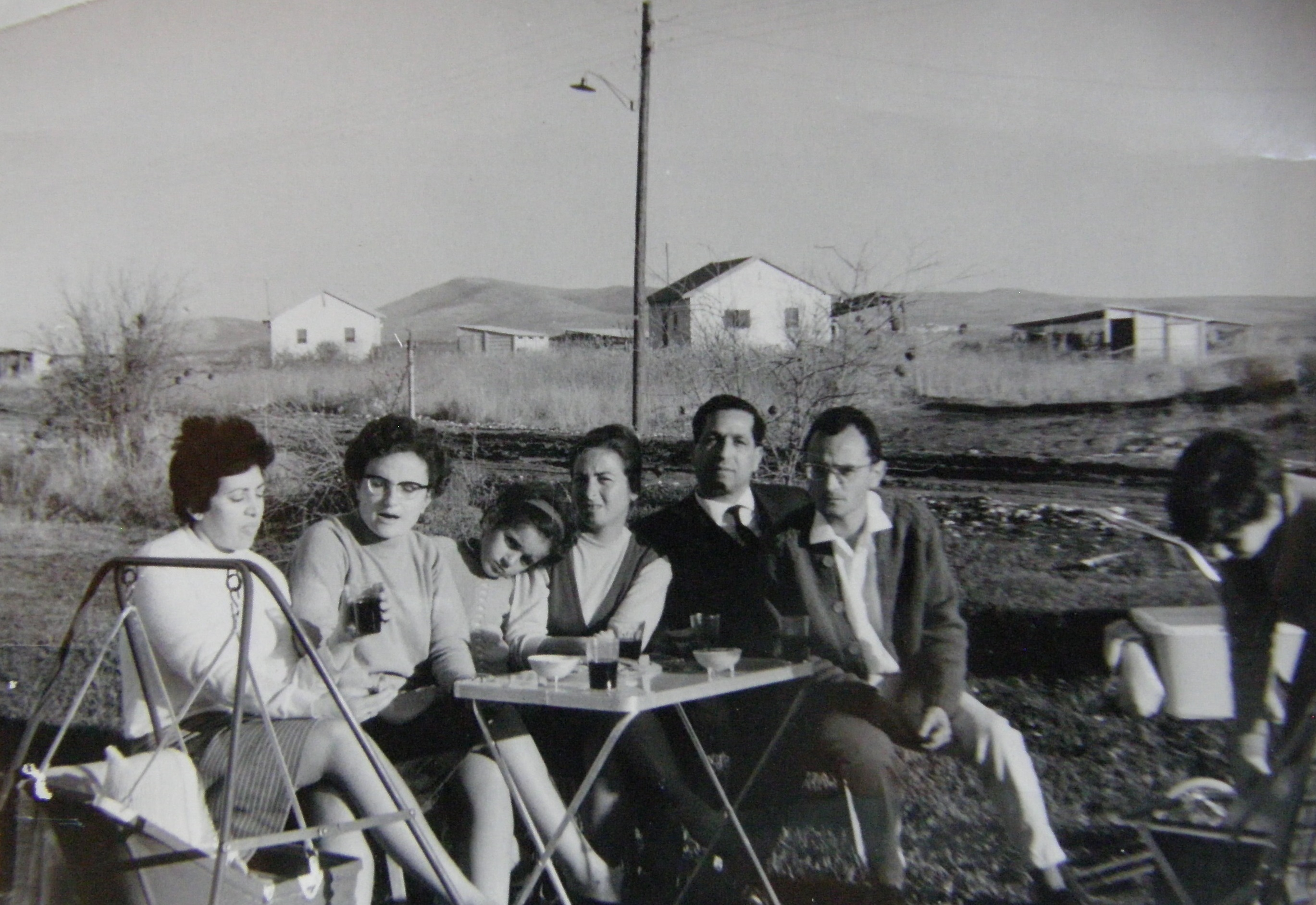 המורים יחזקאל עוזר ואריה בן שמחון על רקע בתי הסוכנות הייחודיים בתחילת ייסוד מושבי תענך.